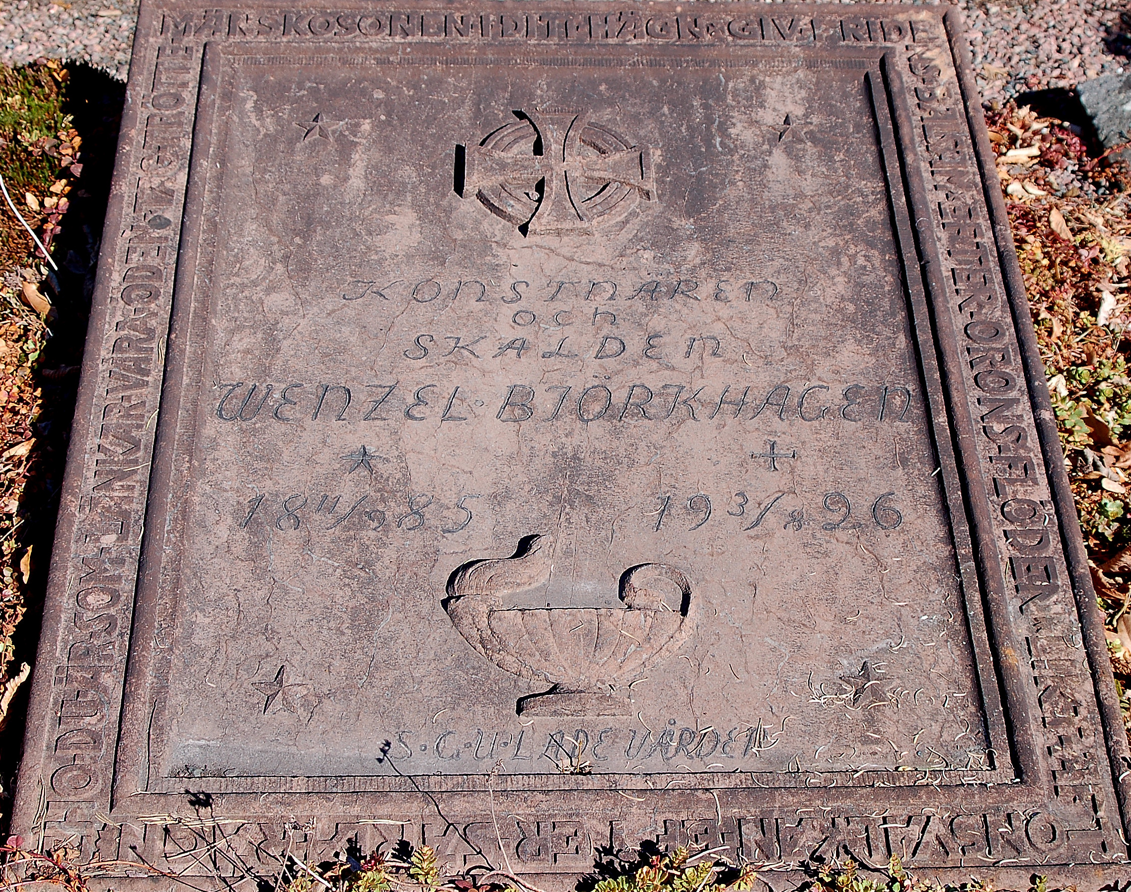 Wenzel Björkhagens gravvård på Hammarö Kyrkogård.